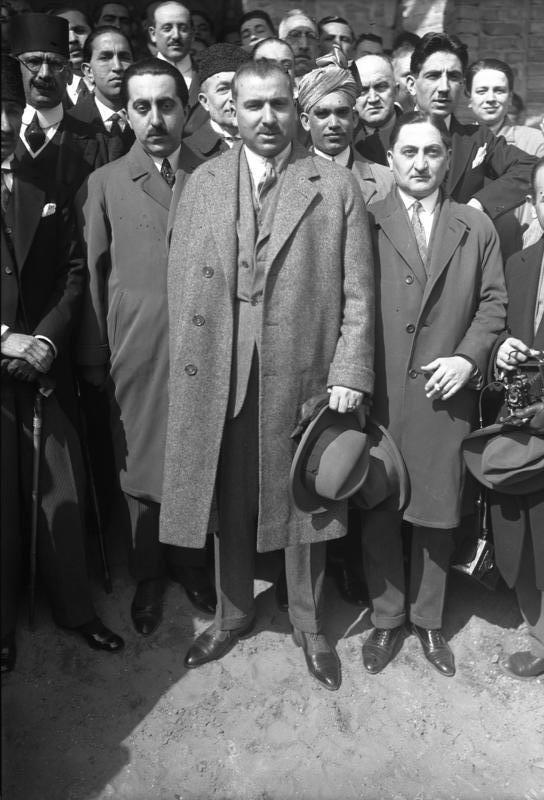 Das türkische Biramfest wurde unter Anwesenheit des türkischen Botschafters und der in Berlin anwesenden Kolonie in der Moschee am Fehrbelliner Platz festlich begangen.